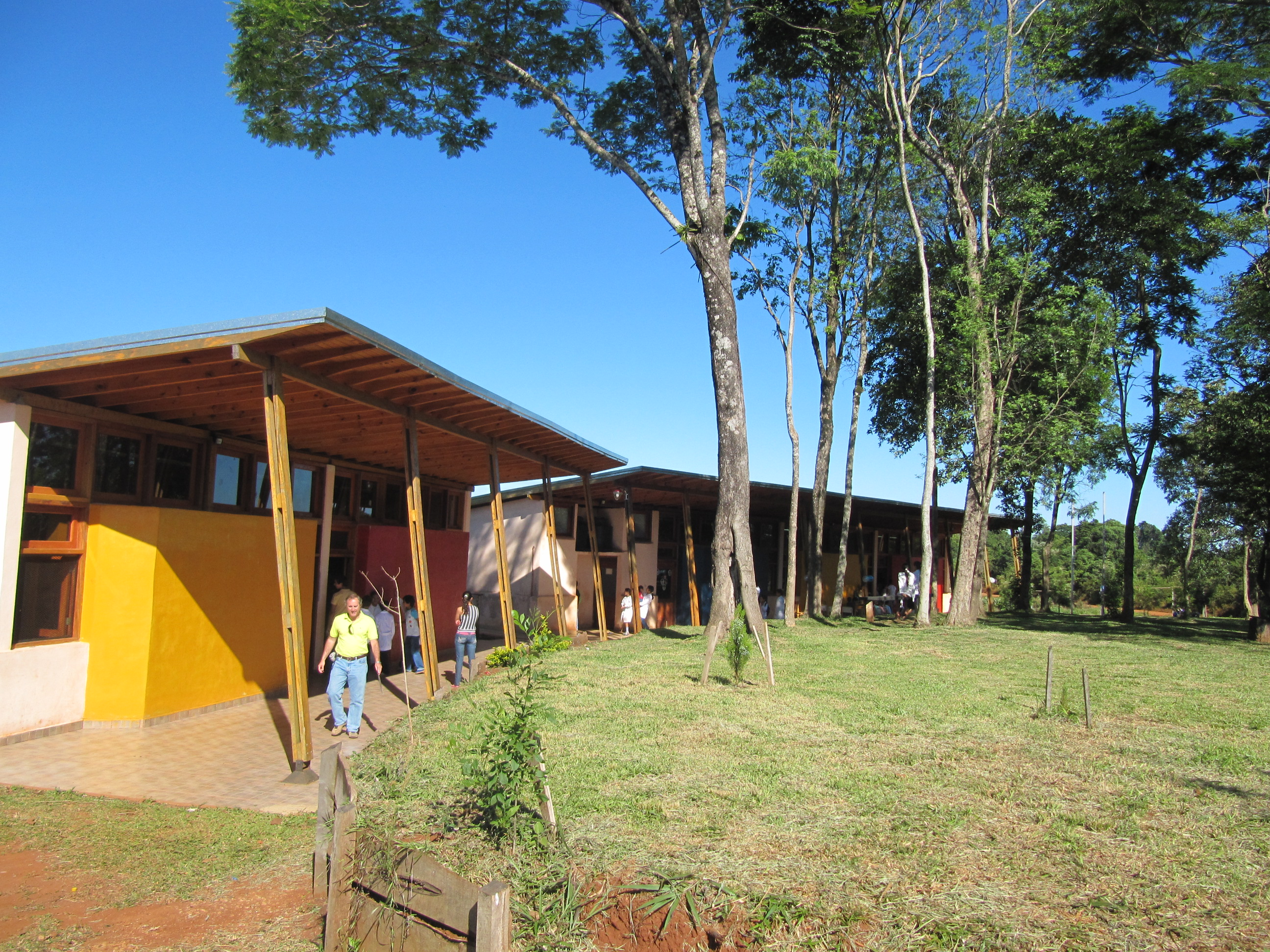 Escuela rural N° 892, “ex Andrés Guacurarí”, actual San Juan Bosco. El arquitecto de esta obra obtuvo en 2010 el premio Bienal de la Sociedad Central de Arquitectos (SCA-CPAU). Se halla en el Departamento San Pedro, en la Provincia de Misiones, Argentina.